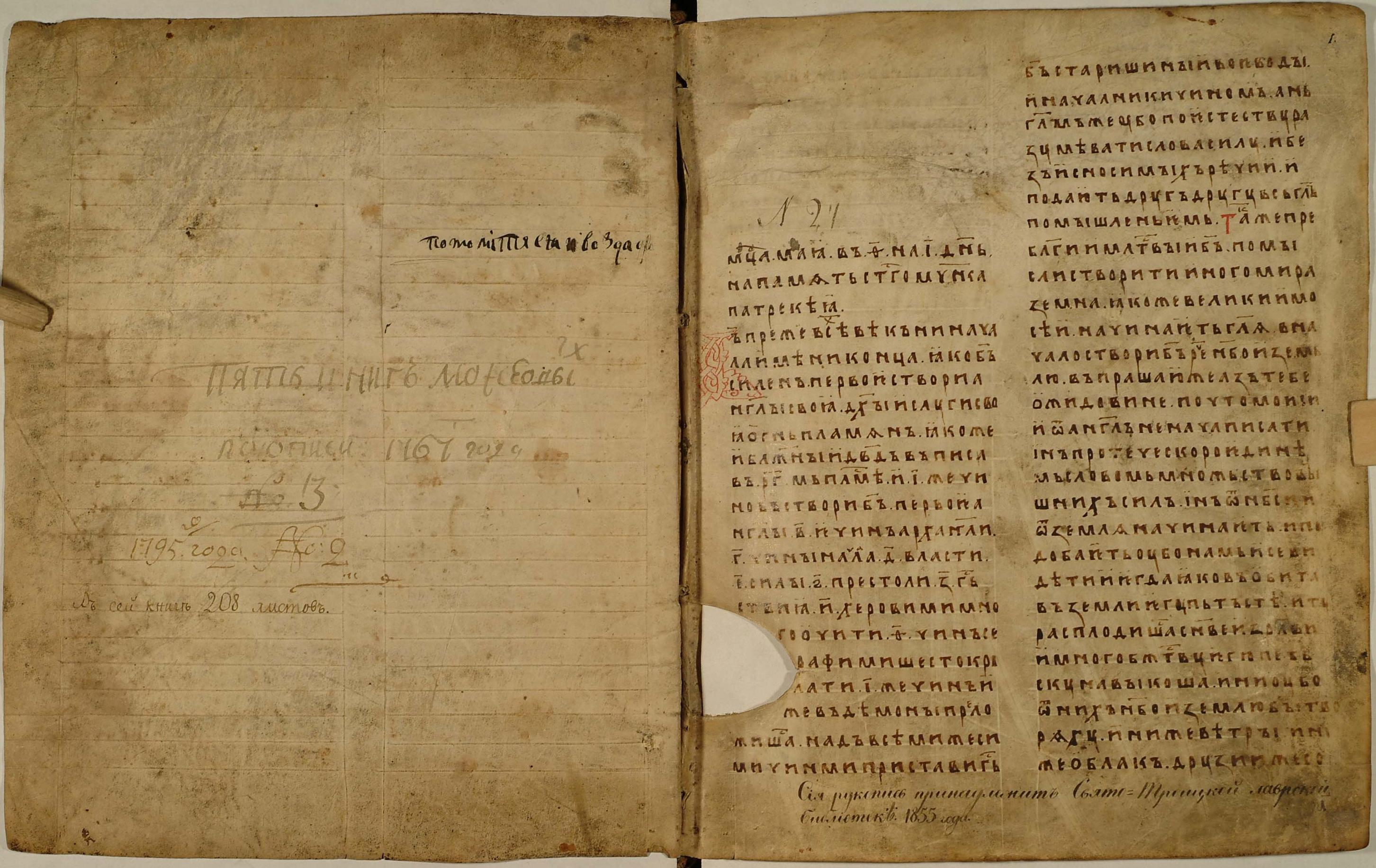 Рукопись № 38. (2014). Палея (от греч. palaiós – ветхий), напис. 1406 года, устав. в два столбца, в лист, 208 л. Фонд 304.I. Главное собрание библиотеки Троице-Сергиевой лавры